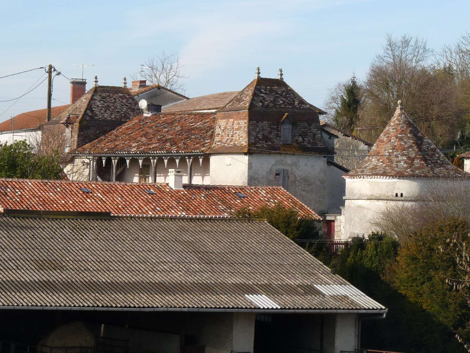 ancienne commanderie de Comberanche, Dordogne, France